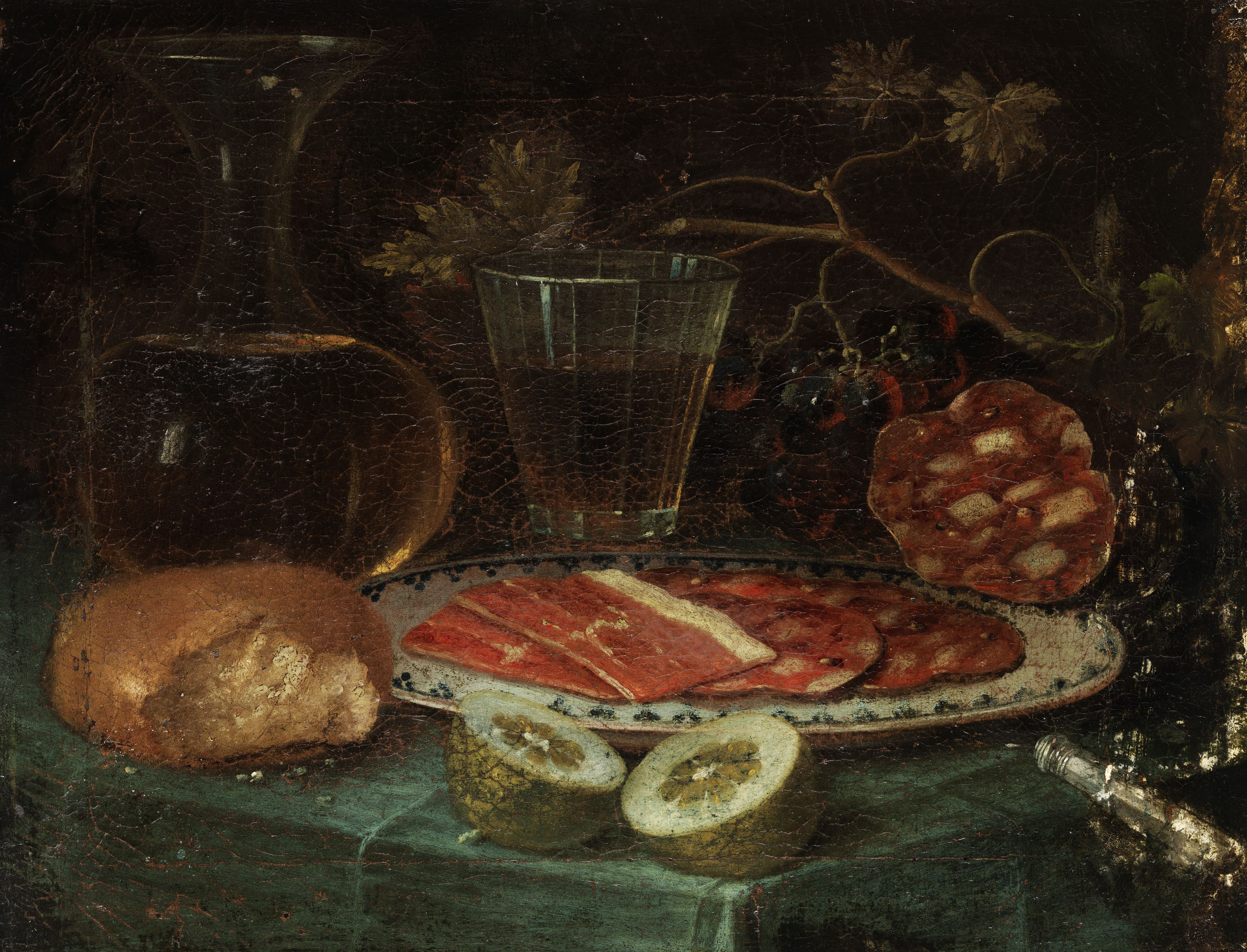 Stillleben mit Brotstück, Glaskaraffe, Weinglas, Platte mit Schinken und Schinkenwurst, Zitrone und Messer mit Perlmuttgriff. Öl auf Leinwand. 31,5 x 41,5 cm.